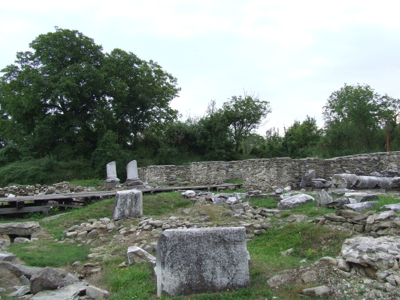 Sarmizegetuza, Hunedoara County, Romania